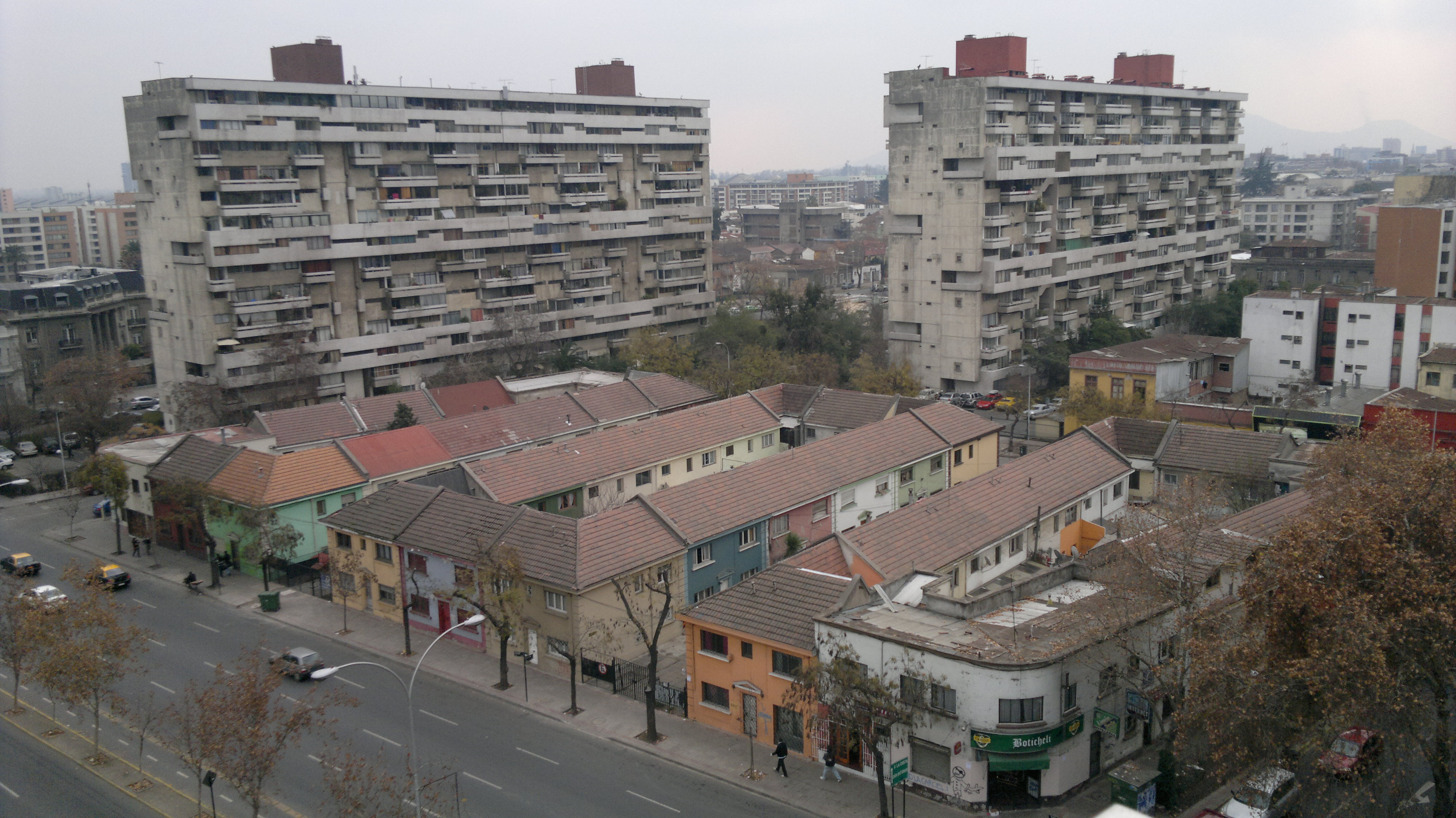 Foto de la Remodelación República, tomada desde Av. Blanco Encalada 2120, edificio de la Facultad de Ciencias Fisicas y Matemáticas de la Universidad de Chile